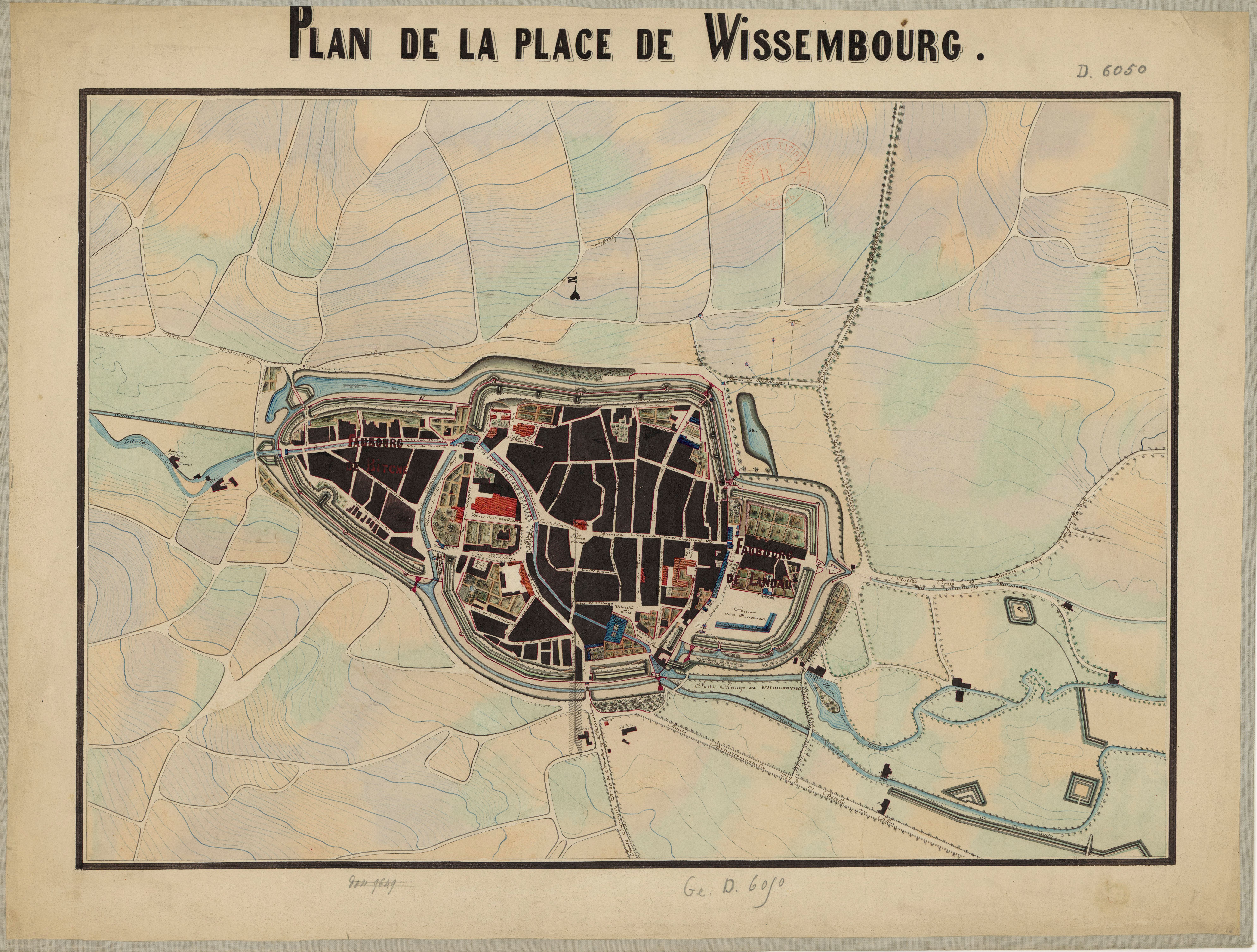 "Plan de la place de Wissembourg" par Antoine-Prosper Delaperche, commandant de la place (nommé à ce poste le 9 avril 1849, puis remplacé vers 1854 par Édouard-Pierre-Charles-Augustin Ménissier).